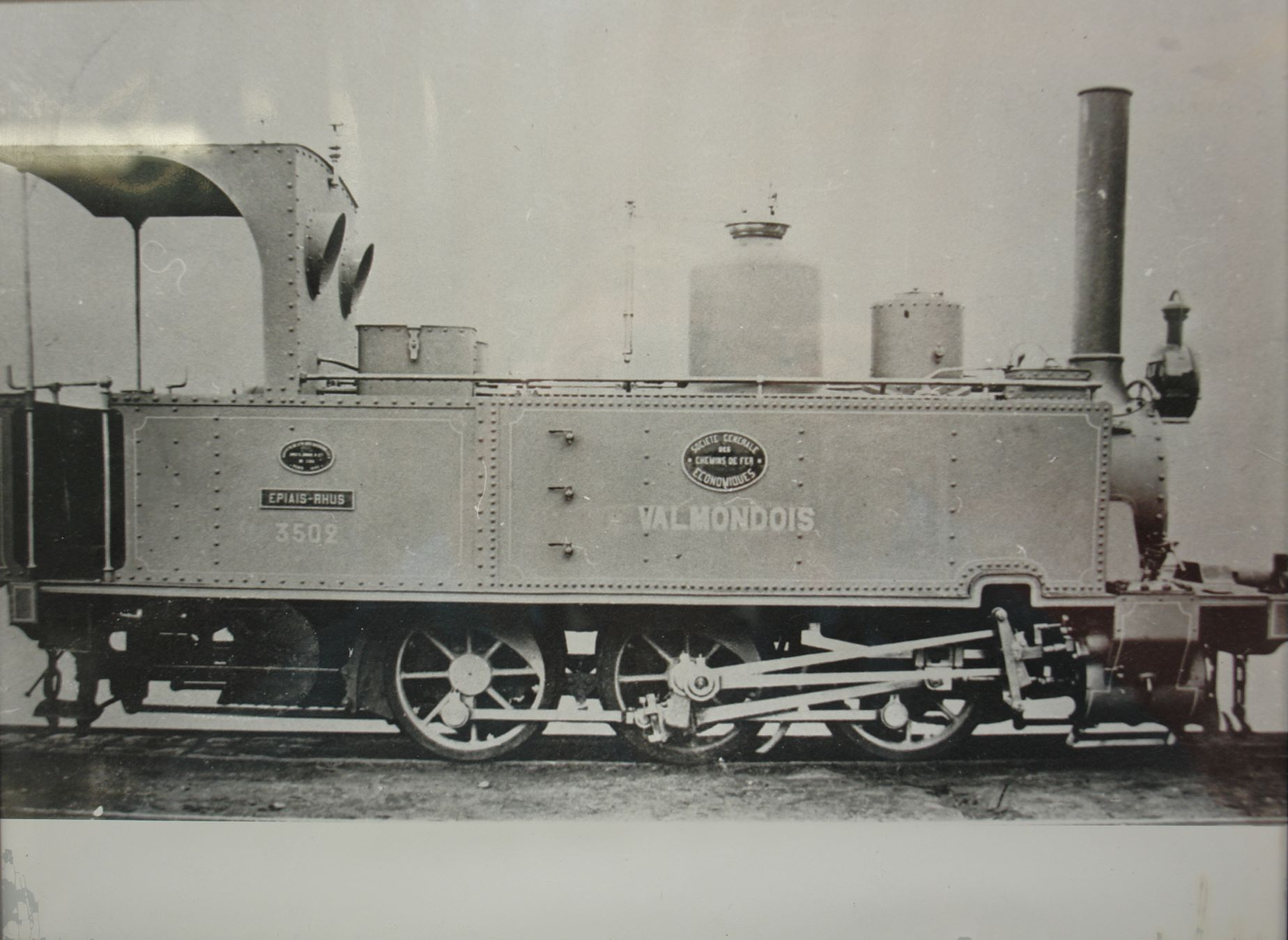 Old photograph exhibited at musée des tramways à vapeur et des chemins de fer secondaires français (Museum of French steam tramways and secondary railways — MTVS) is located alongside Valmondois railway station, in the small town of Butry-sur-Oise in the departement of Val-d'Oise, 30 kilometres (19 mi) north of Paris.